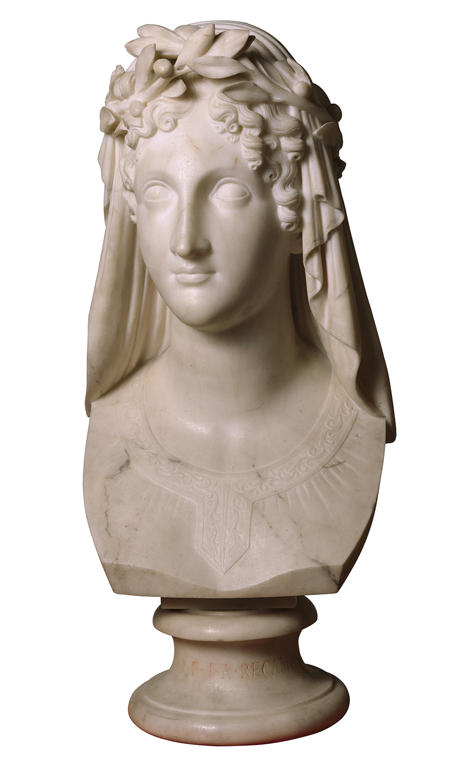 sculpture